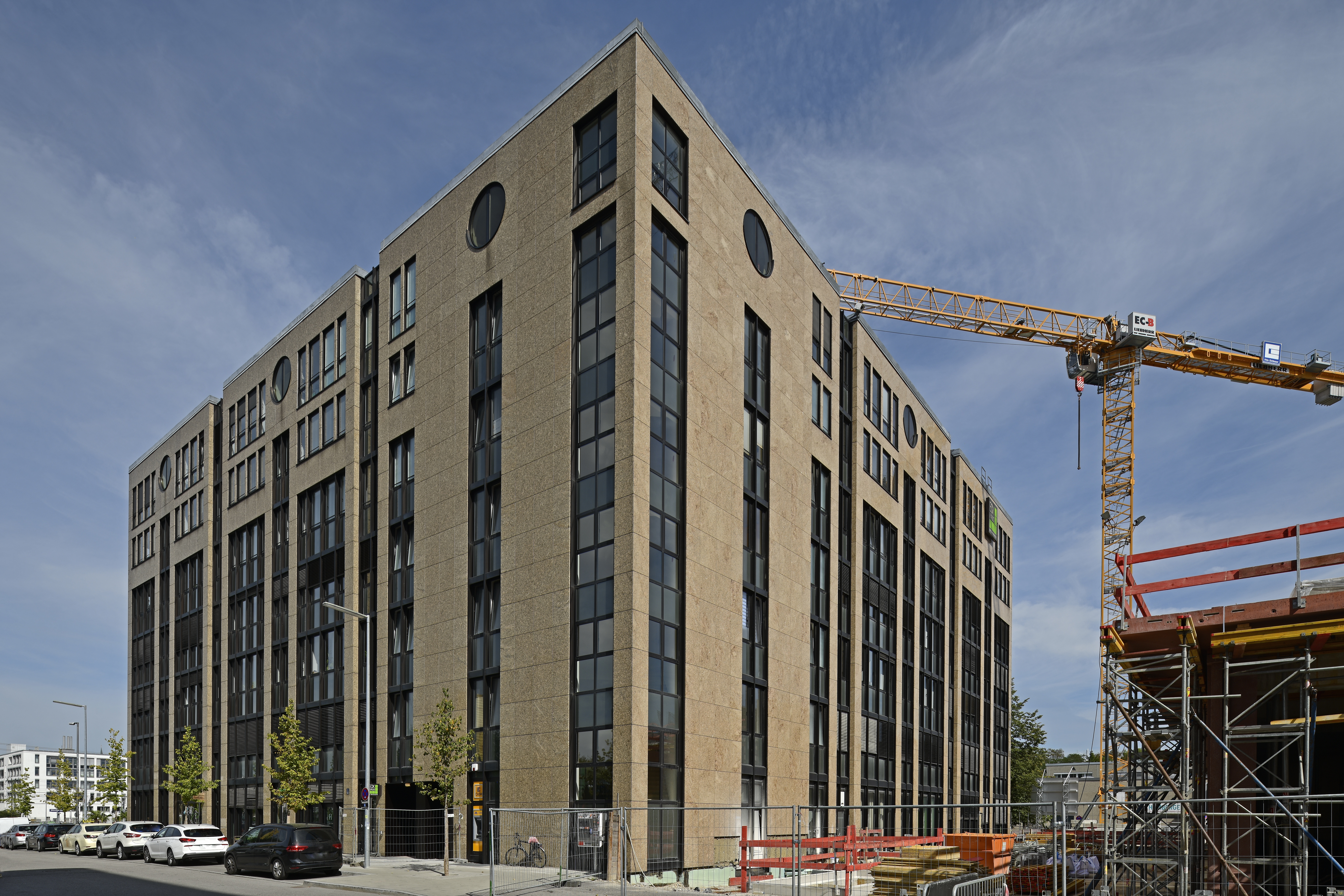 München, Fassadenansicht ECKHaus, Friedenstraße - Atelierstraße - Grafinger Straße. Ehedem Pfanni Hauptverwaltung.